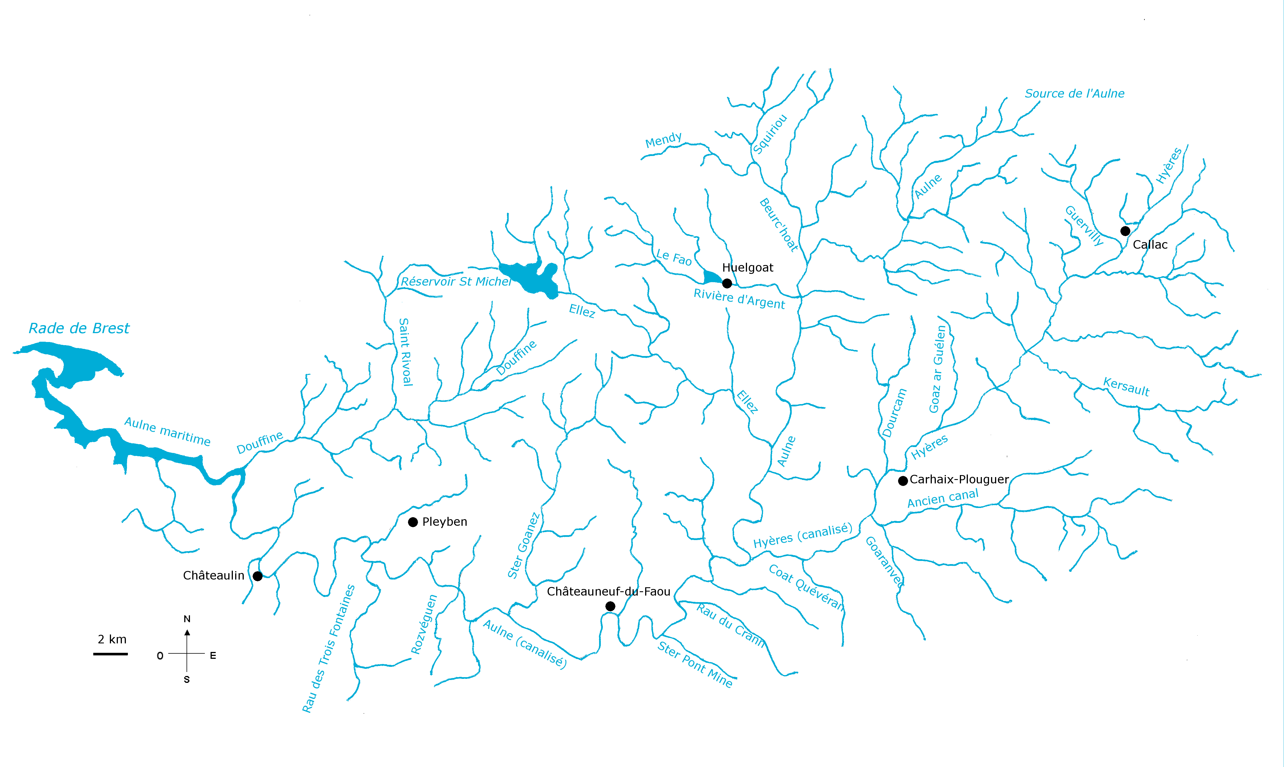 carte hydrographique de l'Aulne et de ses affluents.